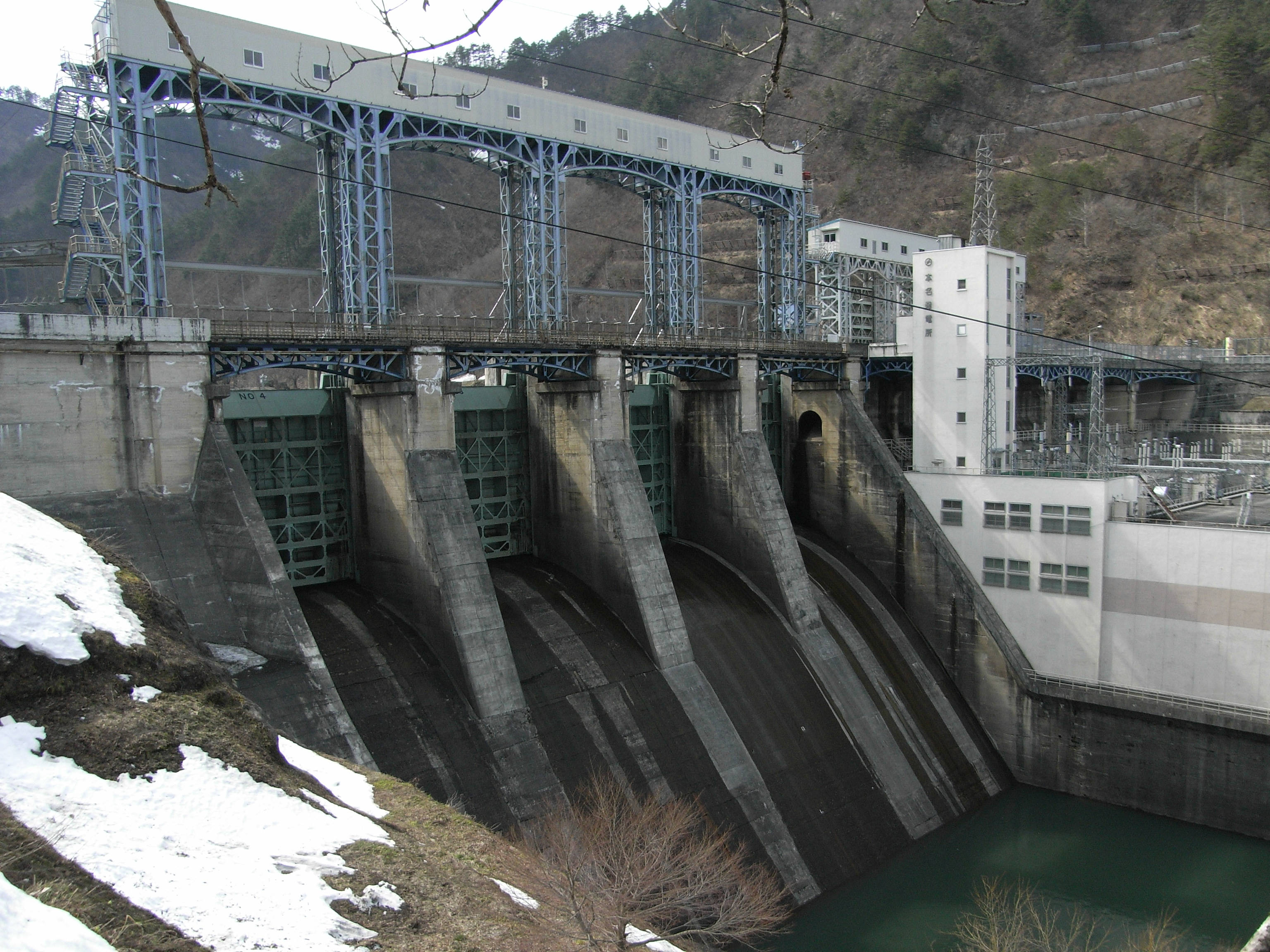 Dam